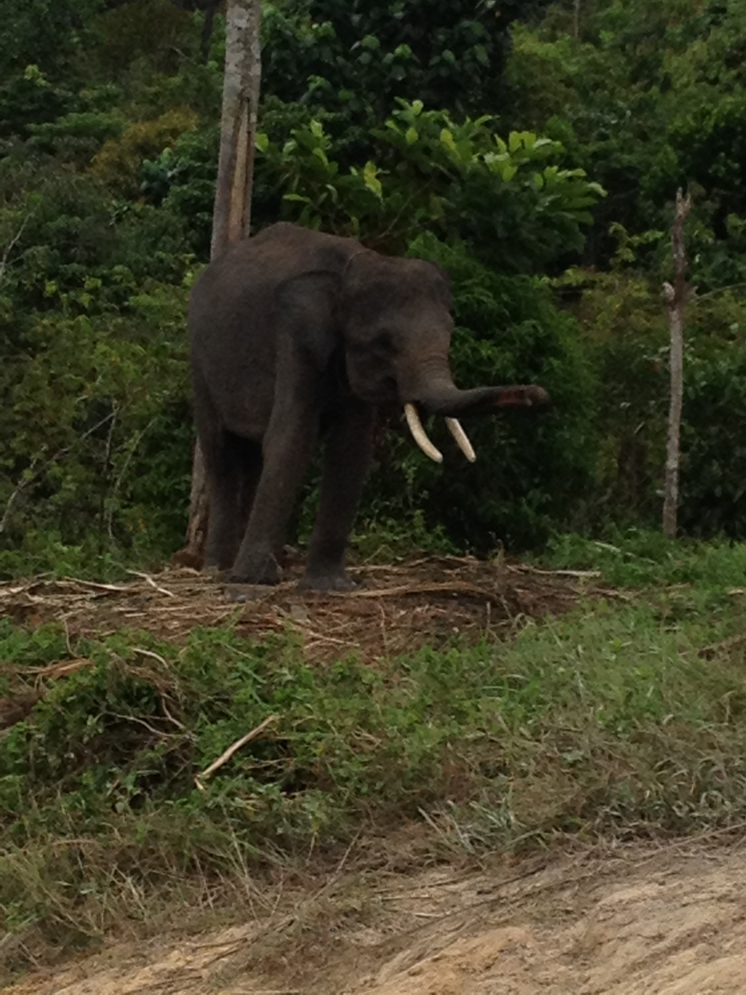 Pelatihan Gajah Riau ini terletak di Minas, sekitar 38 KM dari Pekanbaru. Kalau naik mobil hanya sekitar 1 jam perjalanan. Arahnya Jalan Yos Sudarso Rumbai, Simpang Bingung dan ambil jalur jalan menuju ke Duri. Dekat banget kan? PLG ini berada dibawah pengelolaan Balai Besar KSDA ( Konservasi Sumber Daya Alam dan Ekosistem ) Riau yang merupakan bagian dari Kementrian Lingkungan Hidup dan Kehutanan.